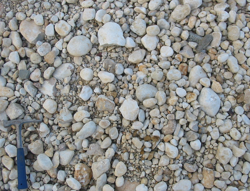 Kruus ja veerised Partsi karjääris Hiiumaal